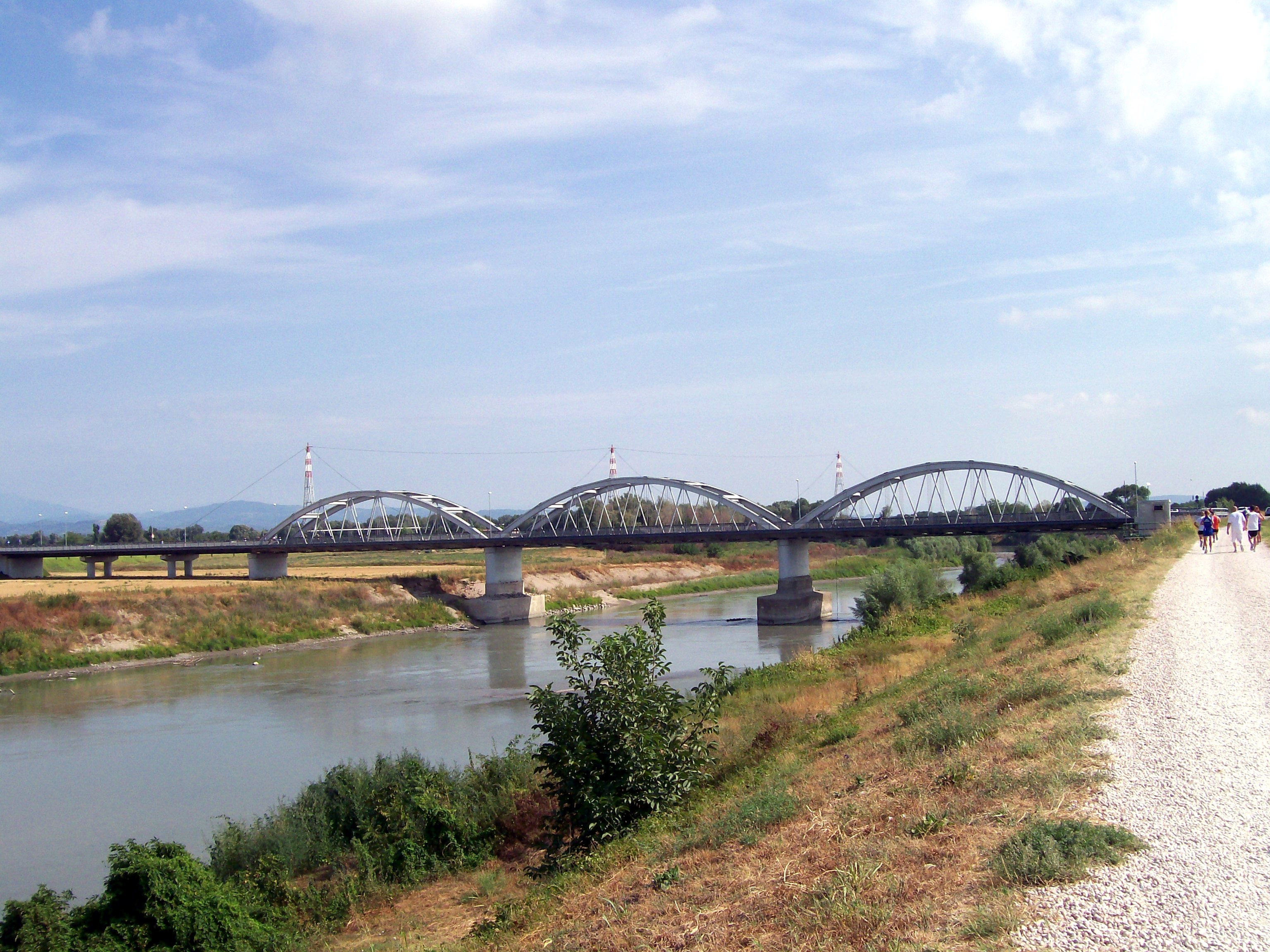 Ponte sul fiume Adige - Albaredo d'Adige (VR).